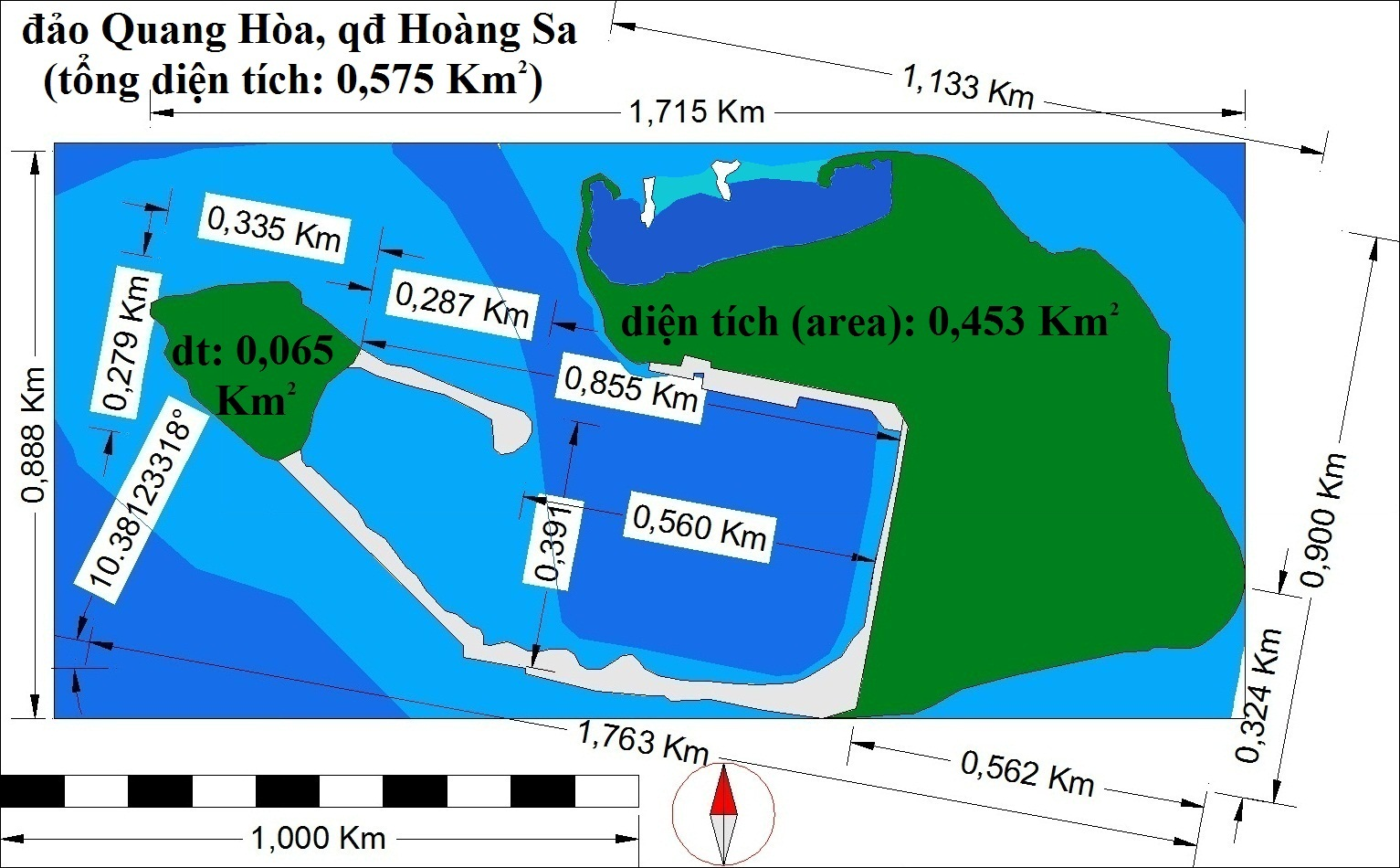 Bản đồ đảo Quang Hòa (Duncan Island, Palm Island) quần đảo Hoàng Sa (Paracel Islands).